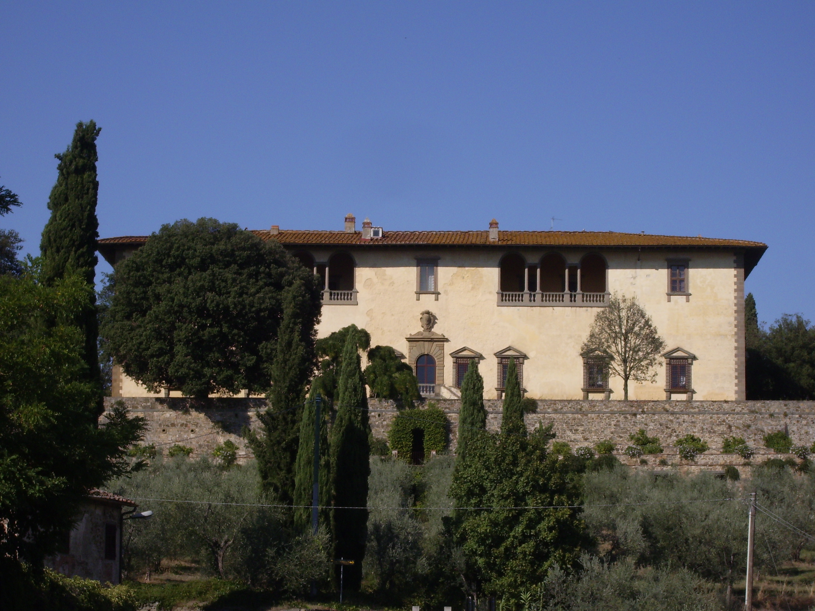 Villa dei Collazzi sulla strada che da San Casciano in val di pesa porta a firenze